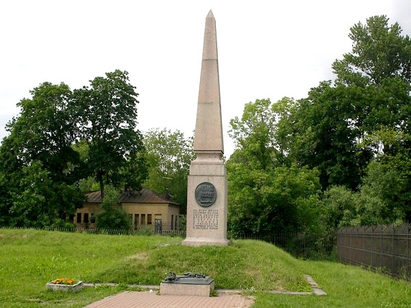 Обелиск казненным в 1826 г. декабристам в кронверке Петропавловской крепости, Кронверкский проспект, Петроградский район, Санкт-Петербург